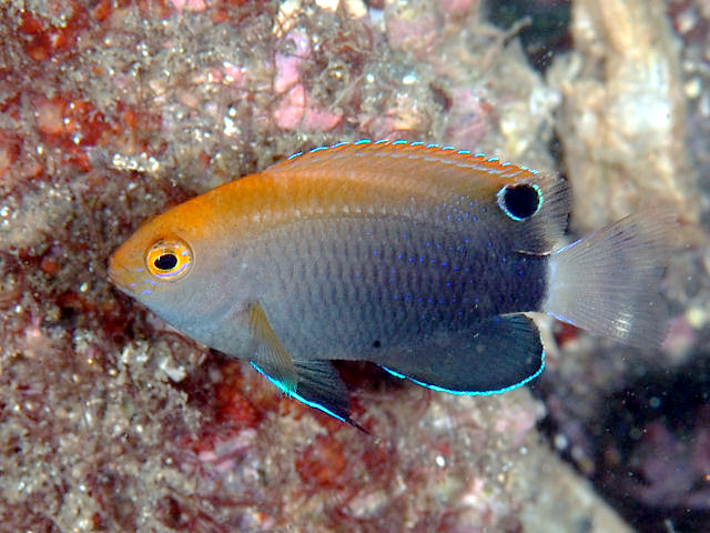 オジロスズメダイ Pomacentrus chrysurus